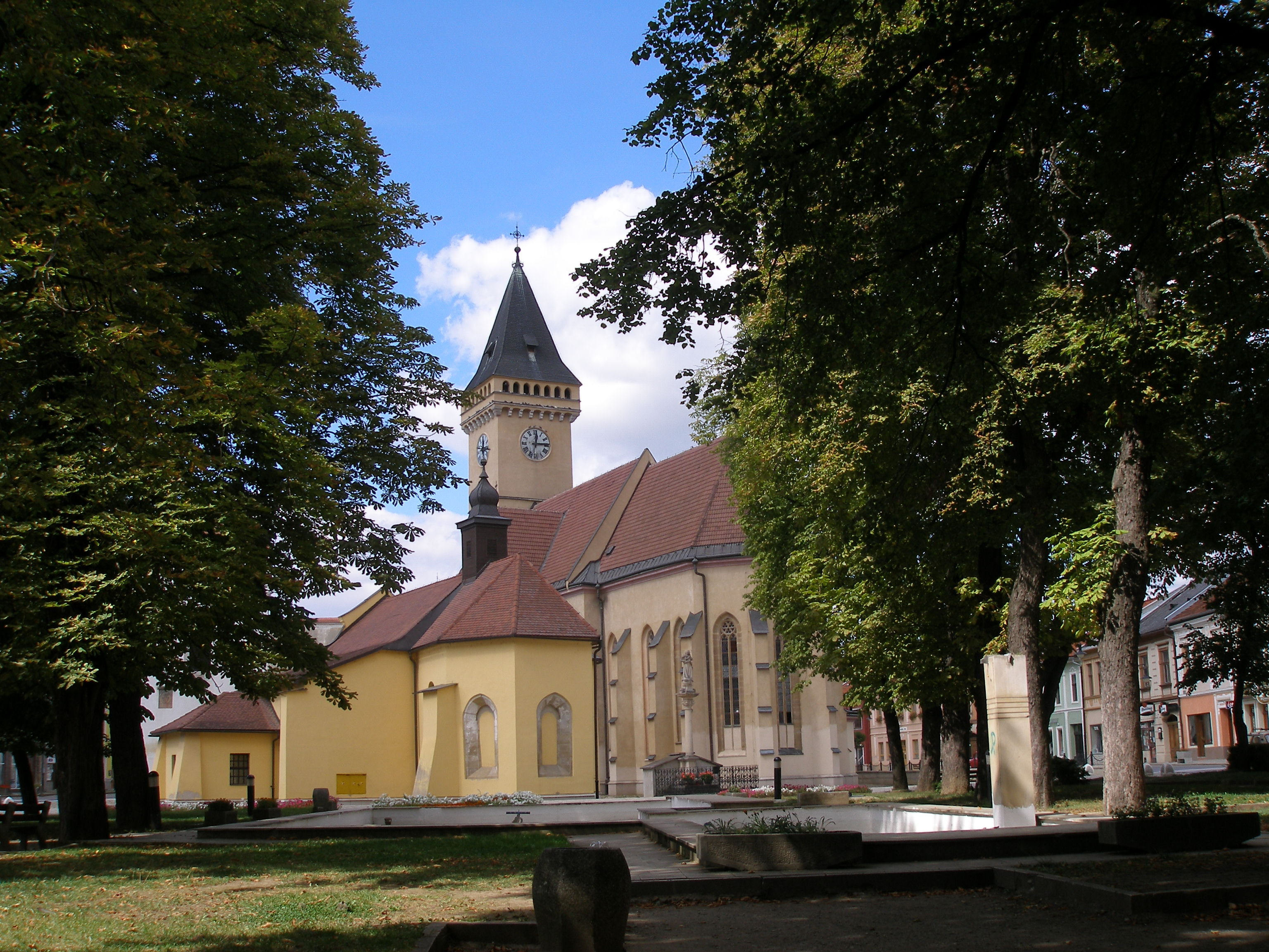 Sabinov starobylé bývalé slobodné kráľovské mesto na Slovensku. Dnes okresné mesto v regióne Šariš.